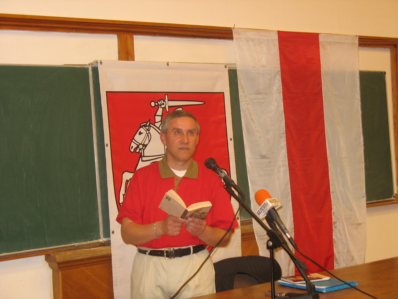 Sławamir Adamowicz, białoruski poeta i działacz polityczny, podczas spotkania na uniwersytecie Collegium Civitas w Pałacu Kultury i Nauki w Warszawie.